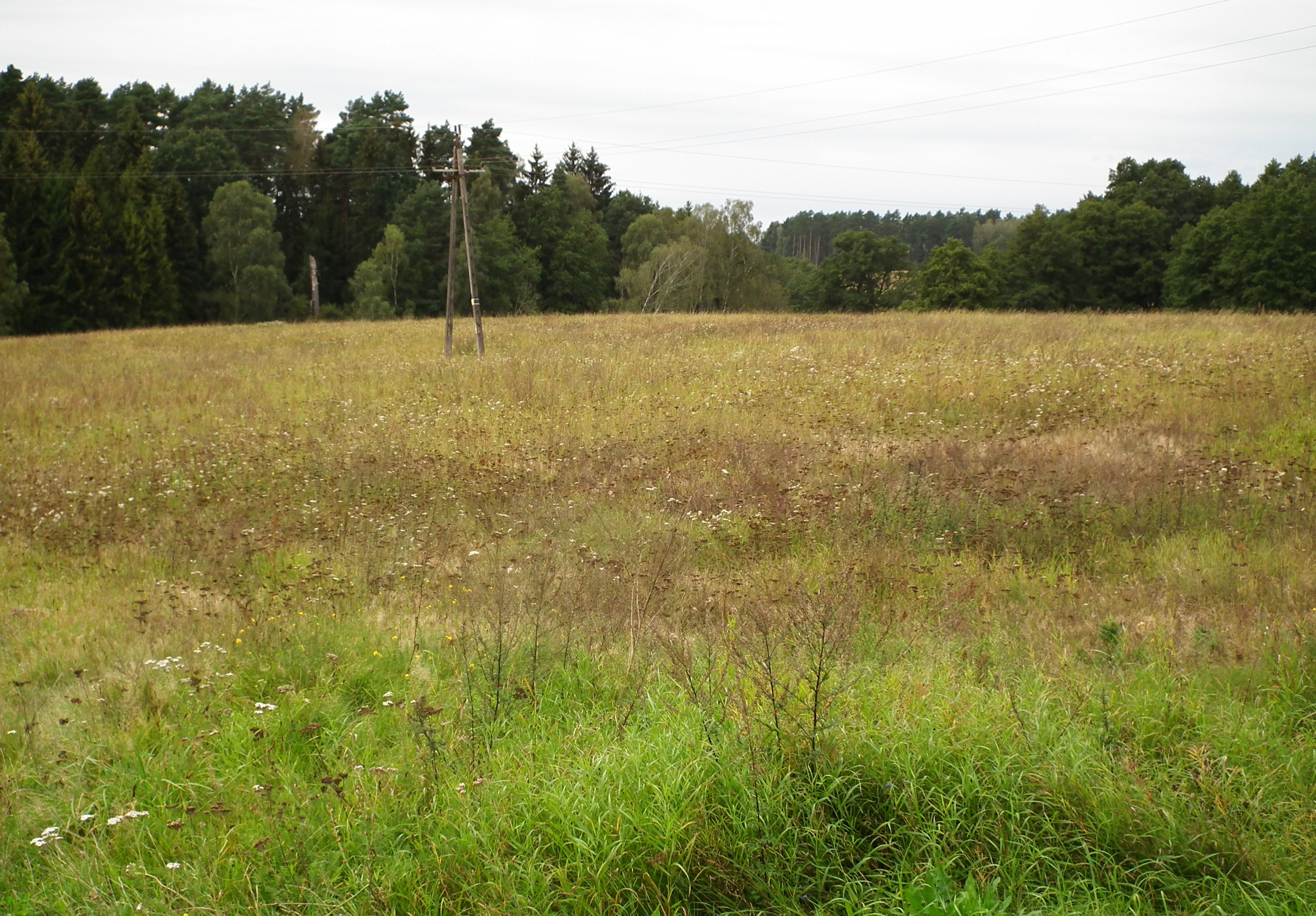 Rojek - krajobraz okolicy.